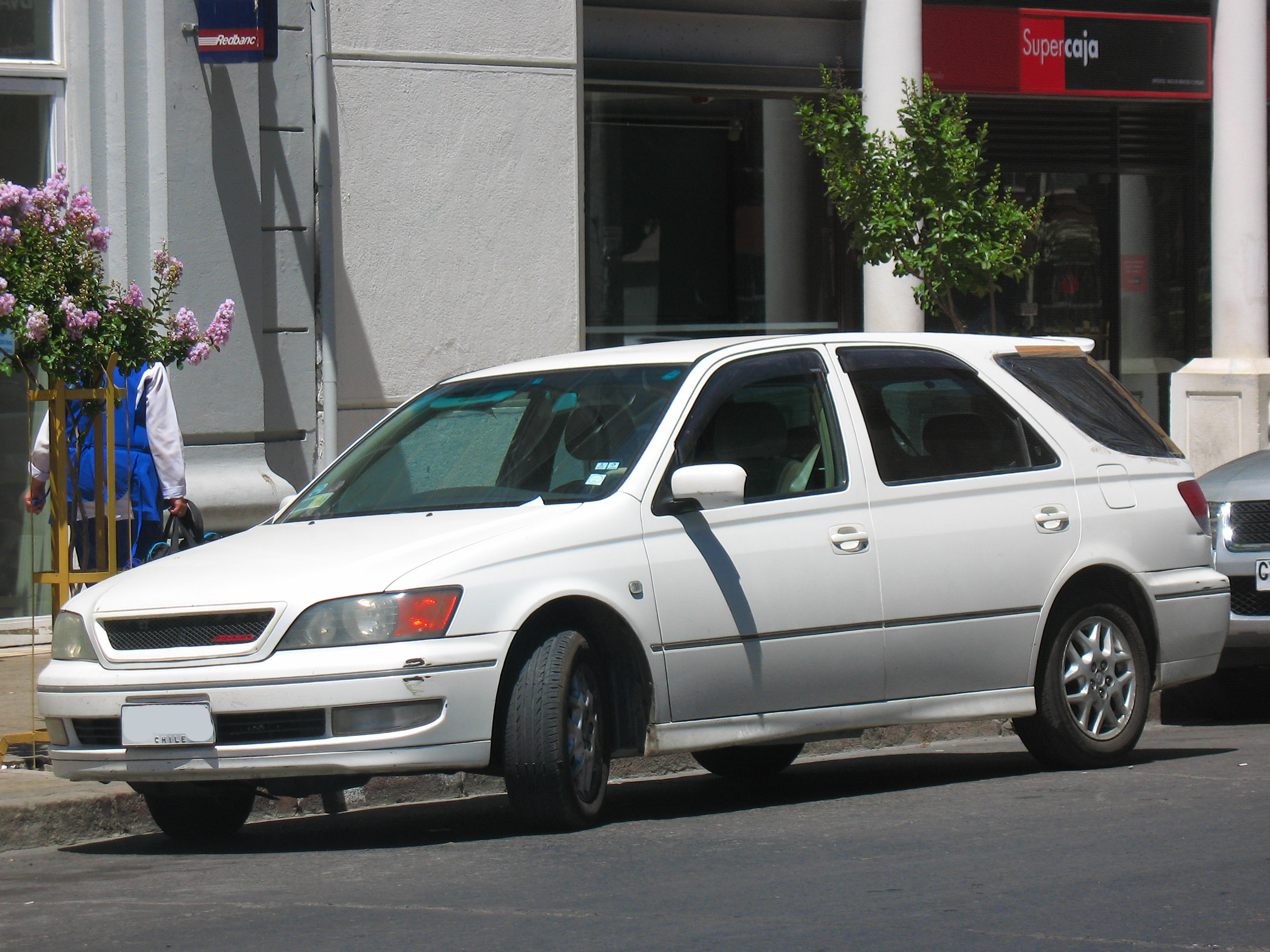 Toyota Vista Ardeo 2.0 D-4 2000